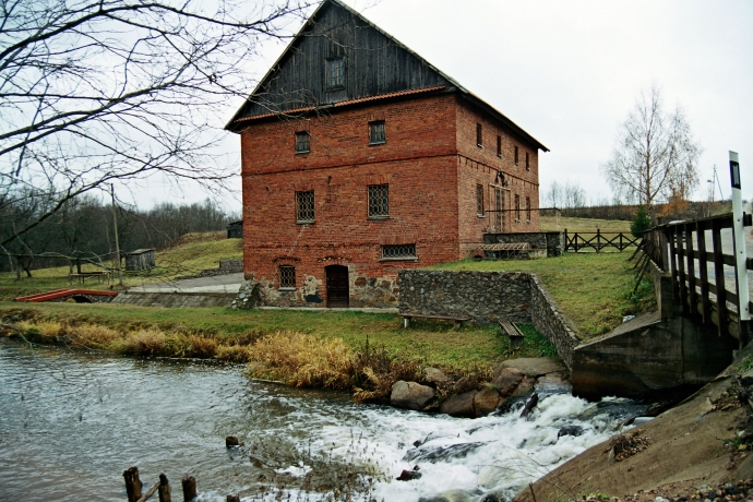 Siesarties malūnas iš Siesarties pusės